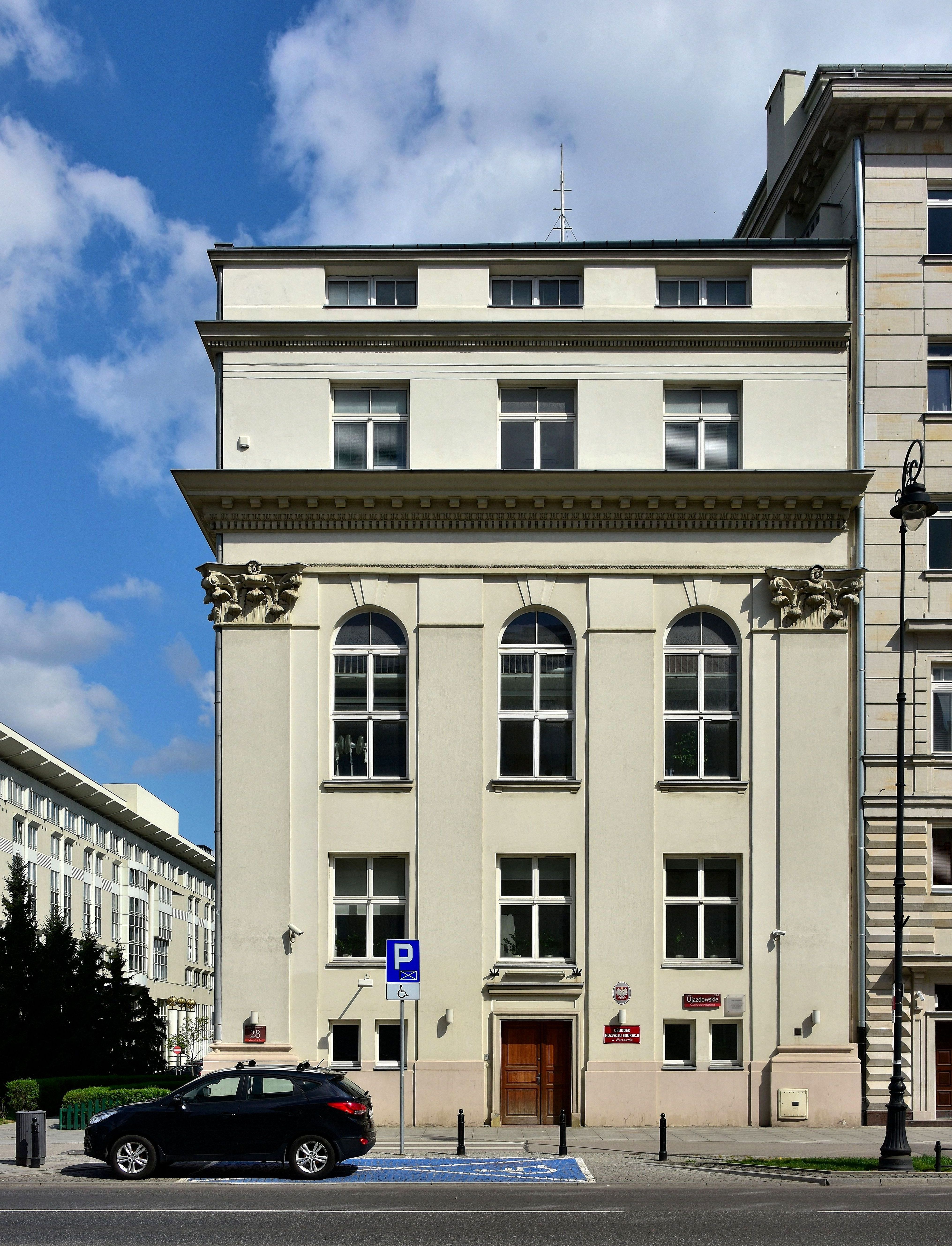 Ośrodek Rozwoju Edukacji w Alejach Ujazdowskich 28 w Warszawie